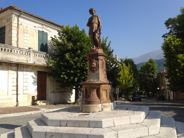 Fontana in ghisa di Giugno (localmente detta di "Saturno")